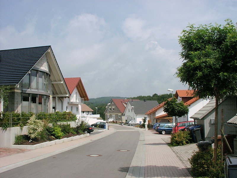 Neubaugebiet Pfarracker, Hochspeyer, Germany